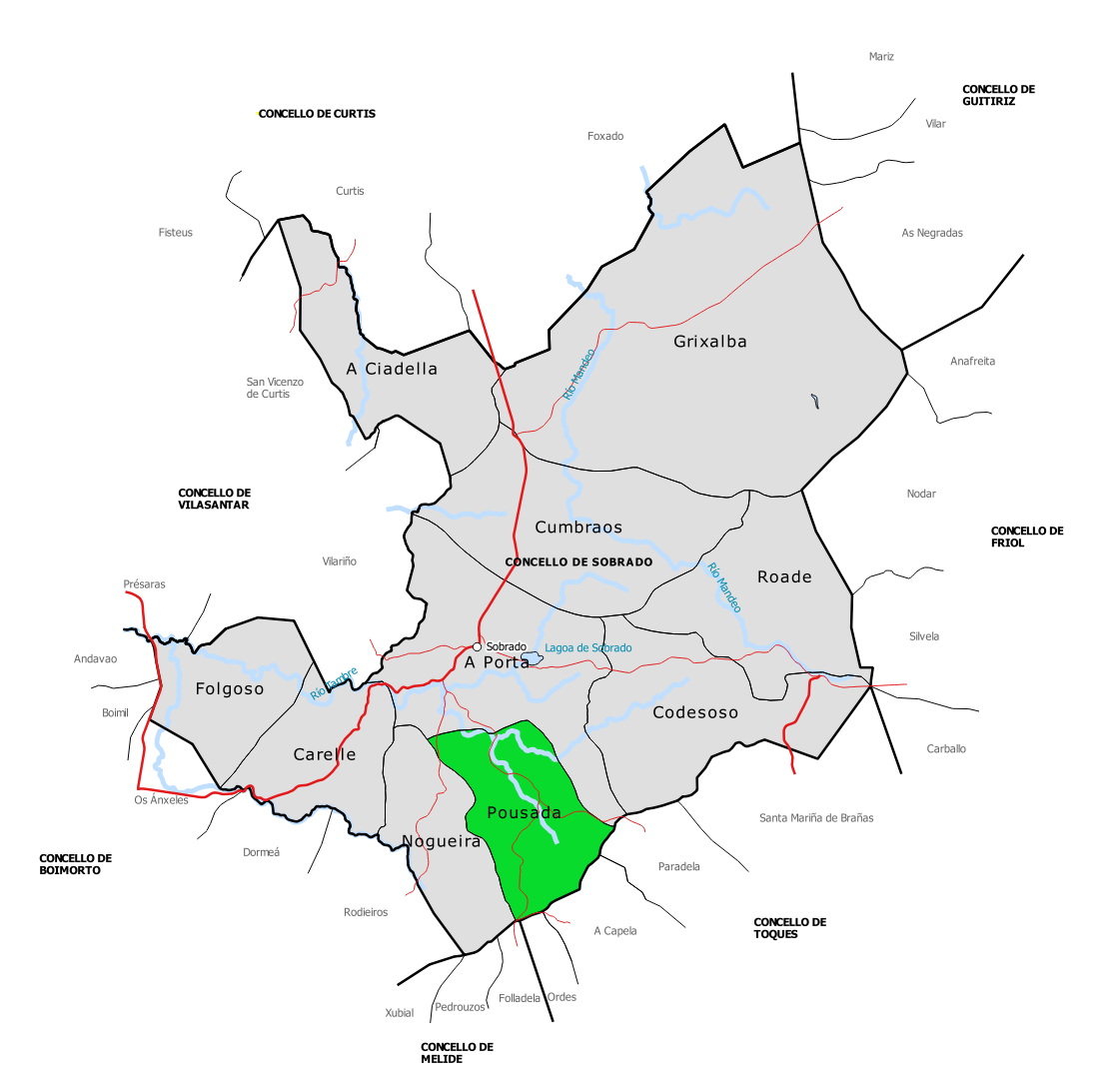 Mapa da parroquia de Pousada no concello de Sobrado (Galiza).